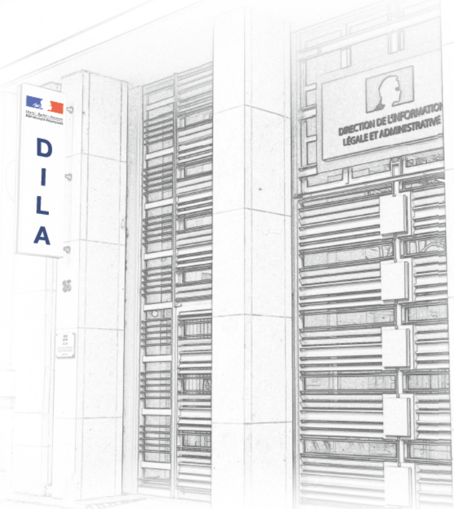 Siège